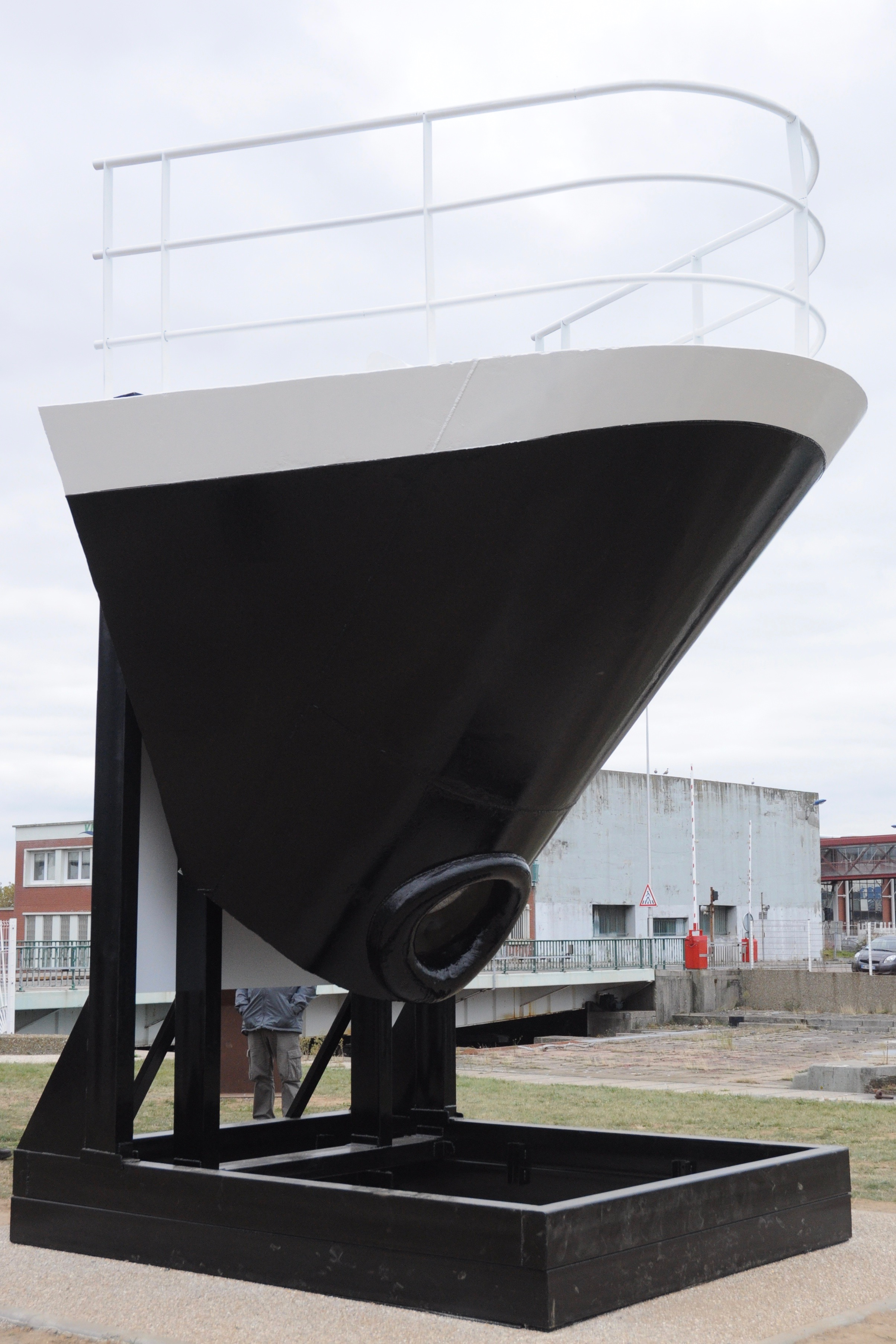 Nez du paquebot France exposé au Havre depuis le 26 septembre 2018, suite au rachat par la ville du havre.